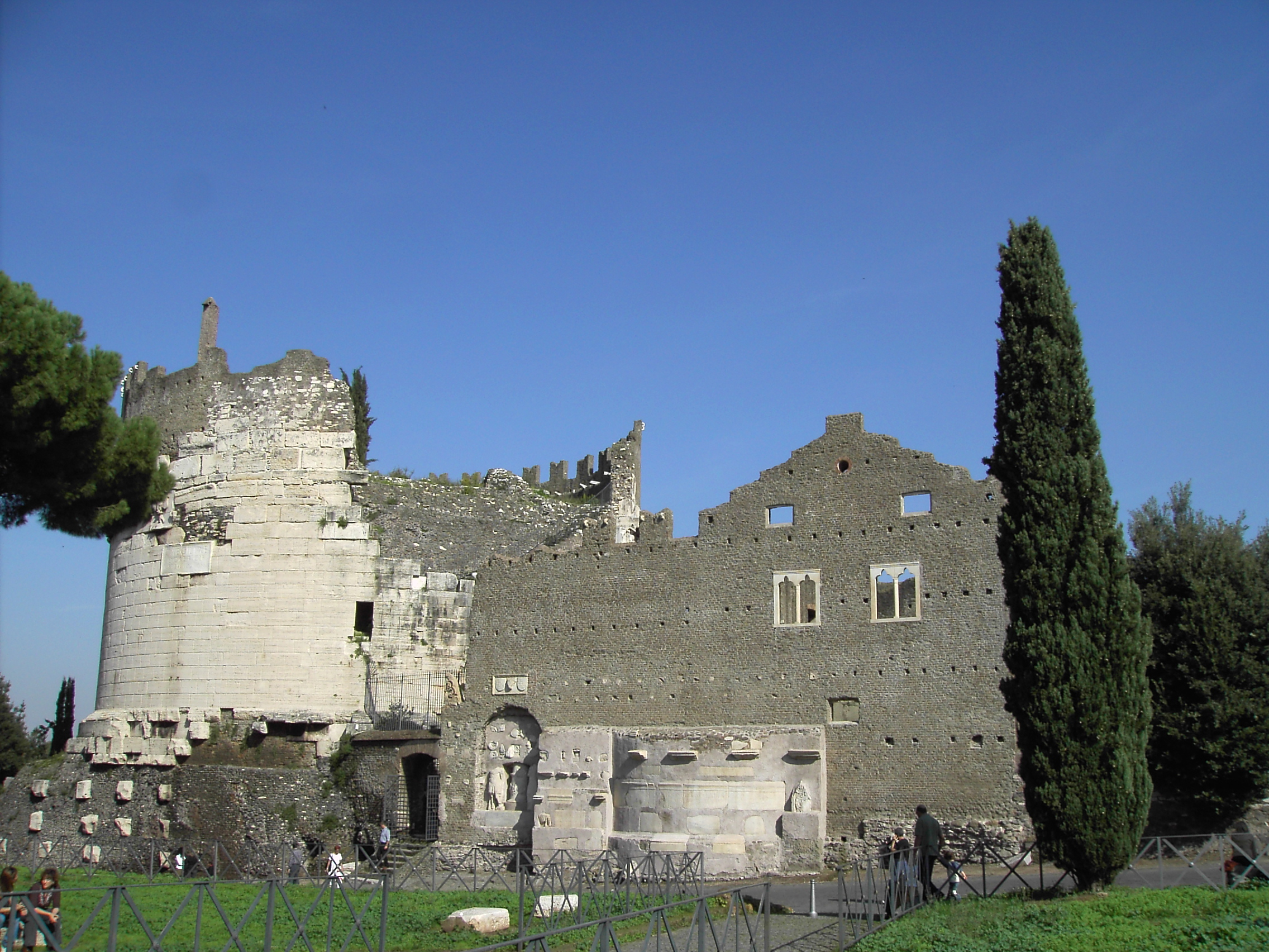 Roma, via appia Antica: mausoleo di Cecilia Metella e Castrum Caetani by Lalupa